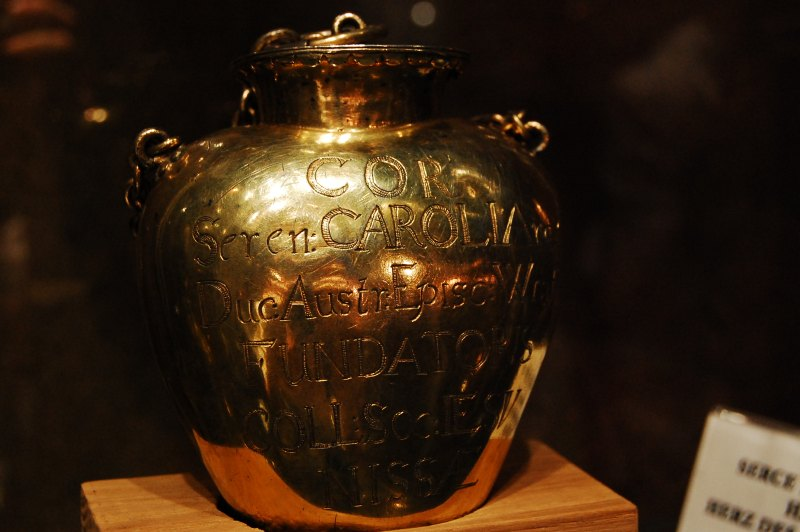 Serce księcia-biskupa wrocławskiego Karola Habsburga. Miejsce przechowywania: Skarbiec św. Jakuba w Nysie.